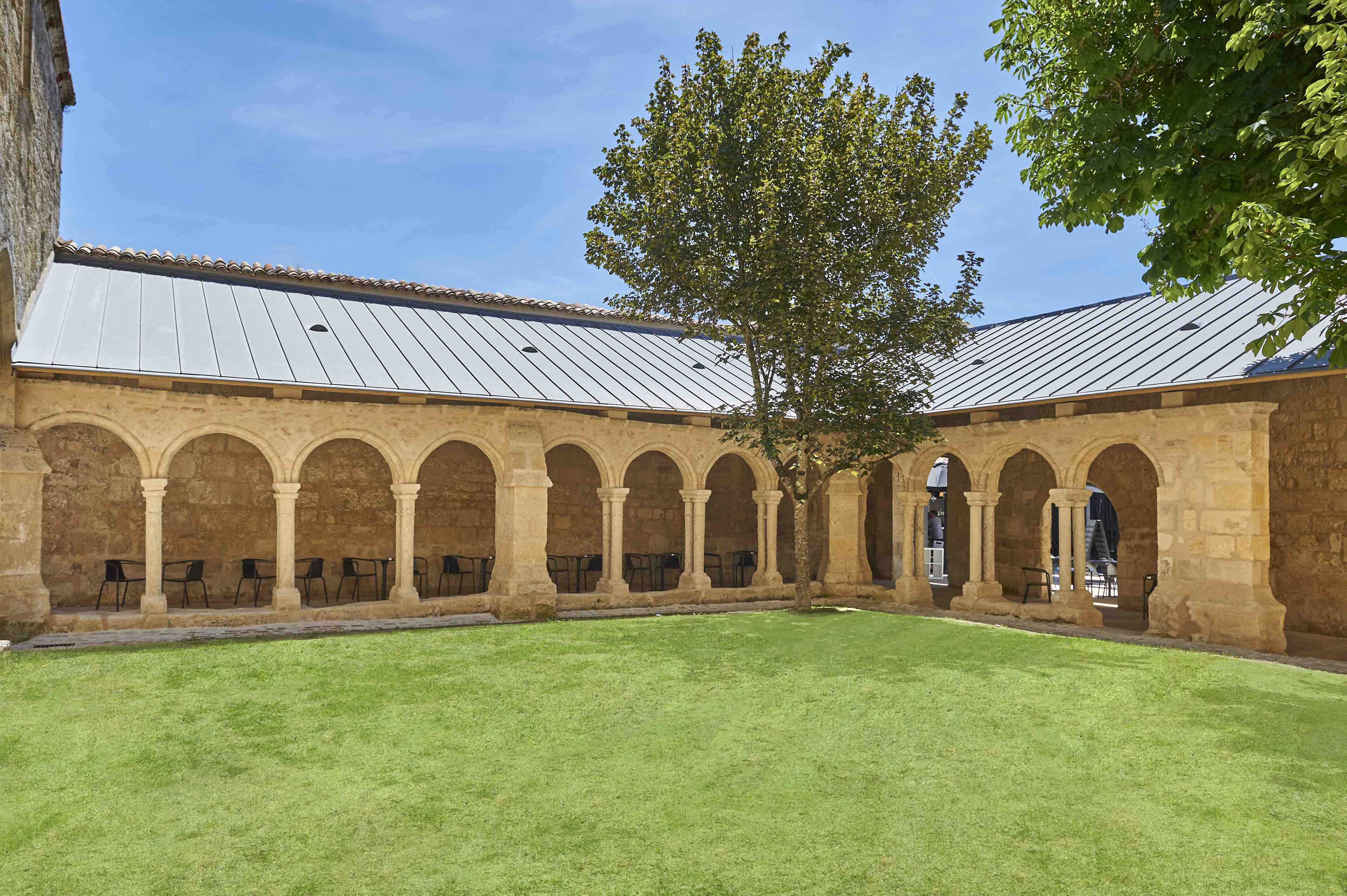 Vue du cloître, monument classé